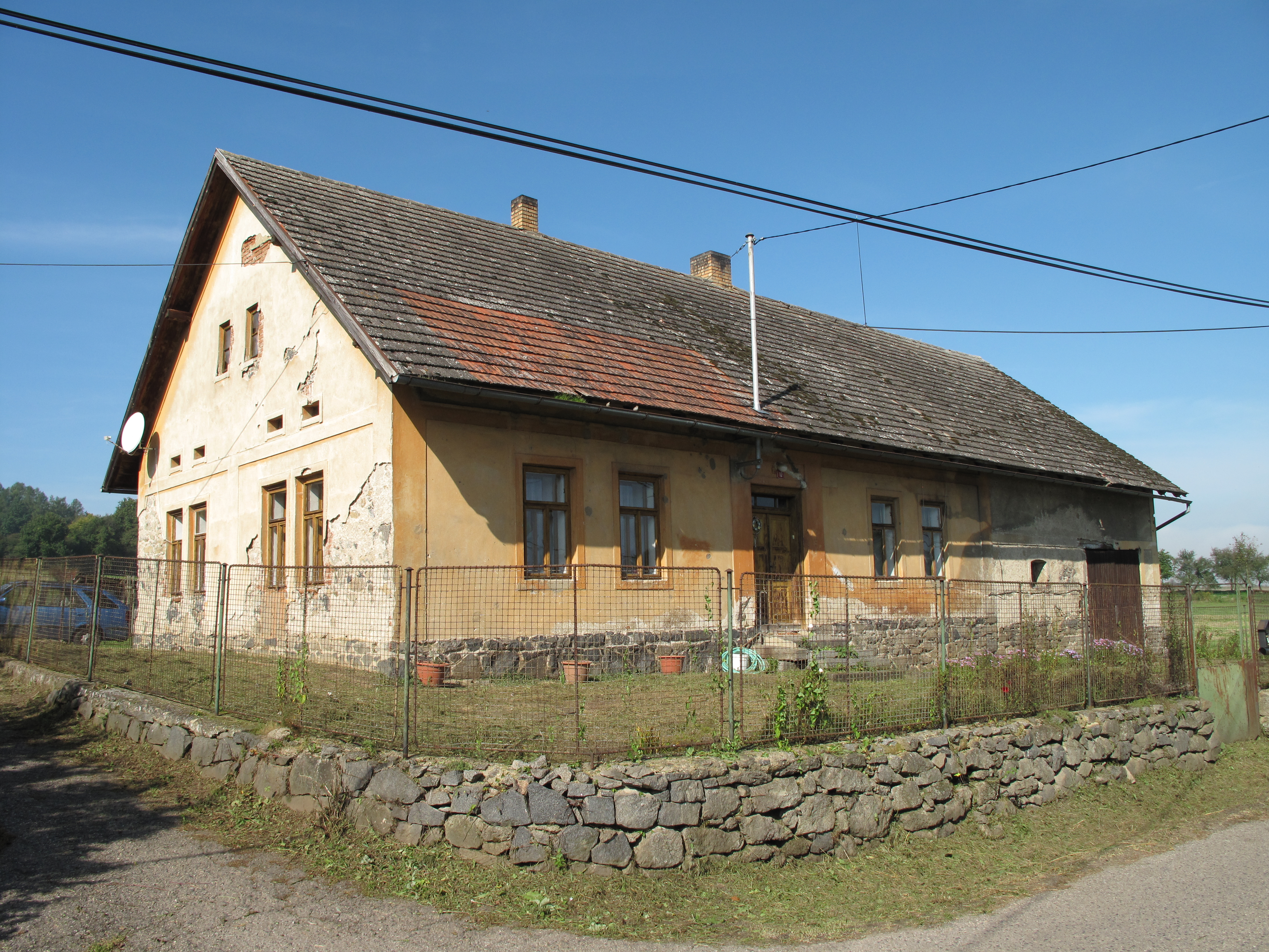 Dům u cesty v Dunávicích. Okres Benešov, Česká republika.